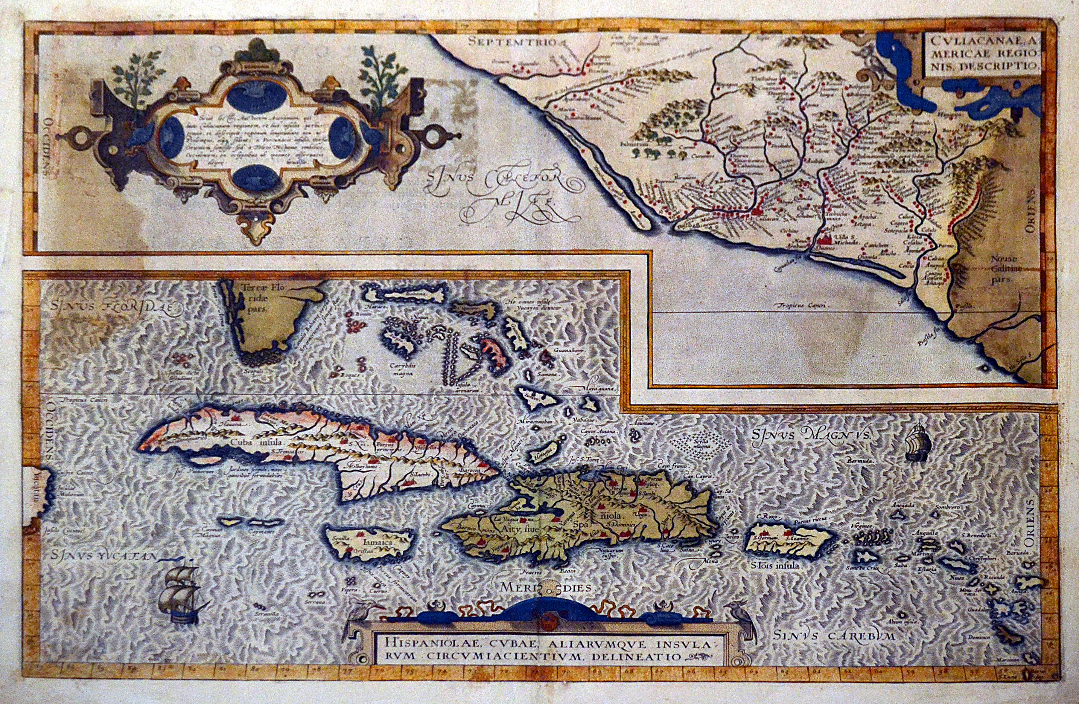 Mapa de las Antillas grabado del siglo XVI. En la parte superior, la costa Pacífica desde el Río Spris S. en Nueva Galicia, hasta Orimen; con representación hidrográfica, montañosa, de vegetación y política, destacando las principales ciudades, entre ellas: Culiacán y Villa S. Michaelis. Abajo, Las Antillas, en el mar Caribe, donde destacan Cuba, Jamaica, La Española (República Dominicana y Haití) y Puerto Rico. Museo de América nº inv. 488.